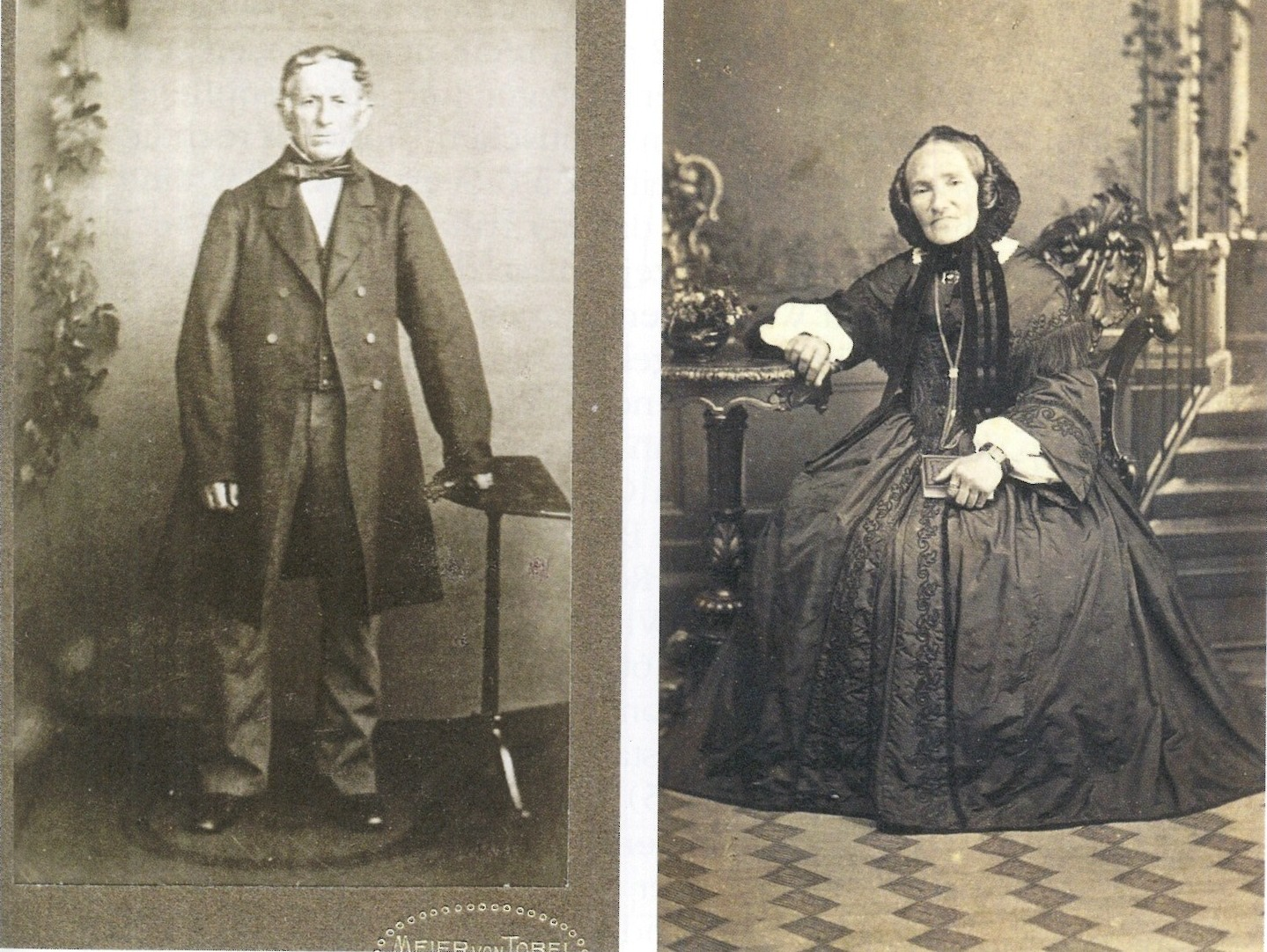 Gugger (Zollikon)